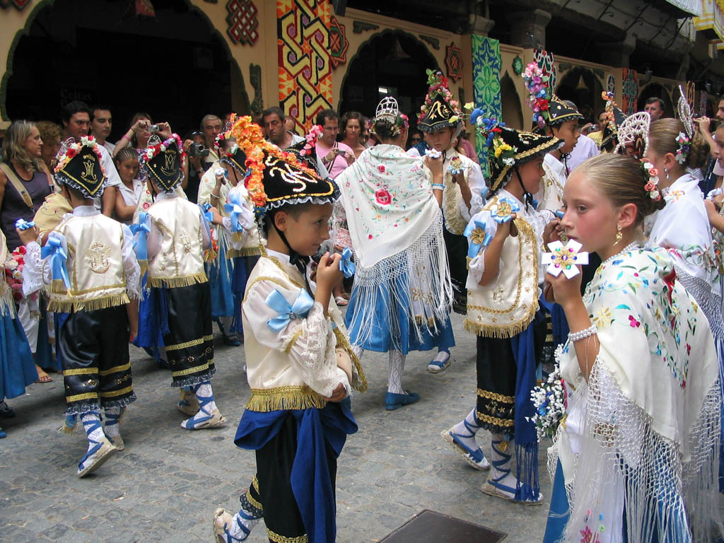 Dansa dels Llauradors en el Sexenni de Morella de 2006 (Els Ports)